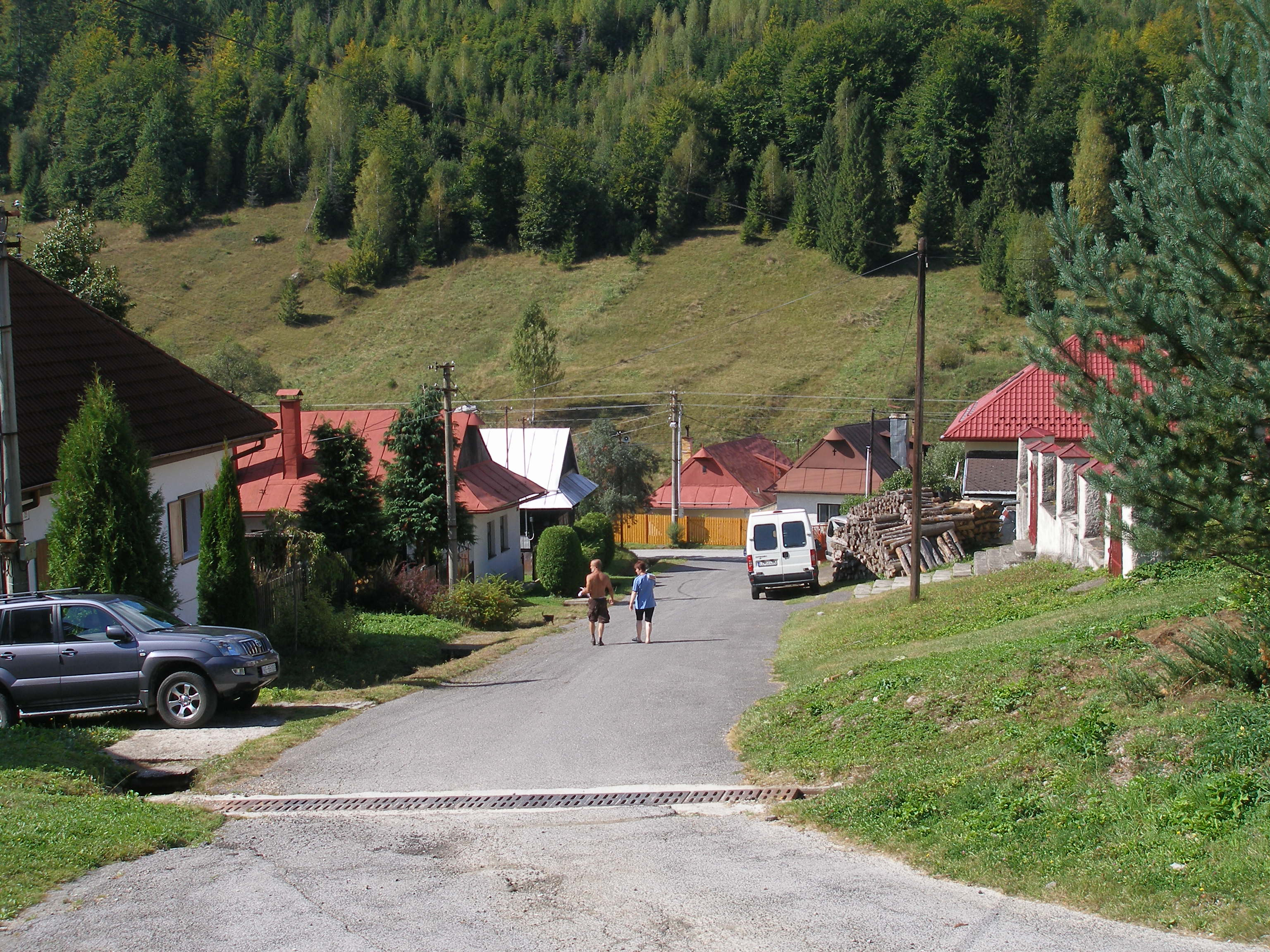 Spišská obec Henclová okres Gelnica.